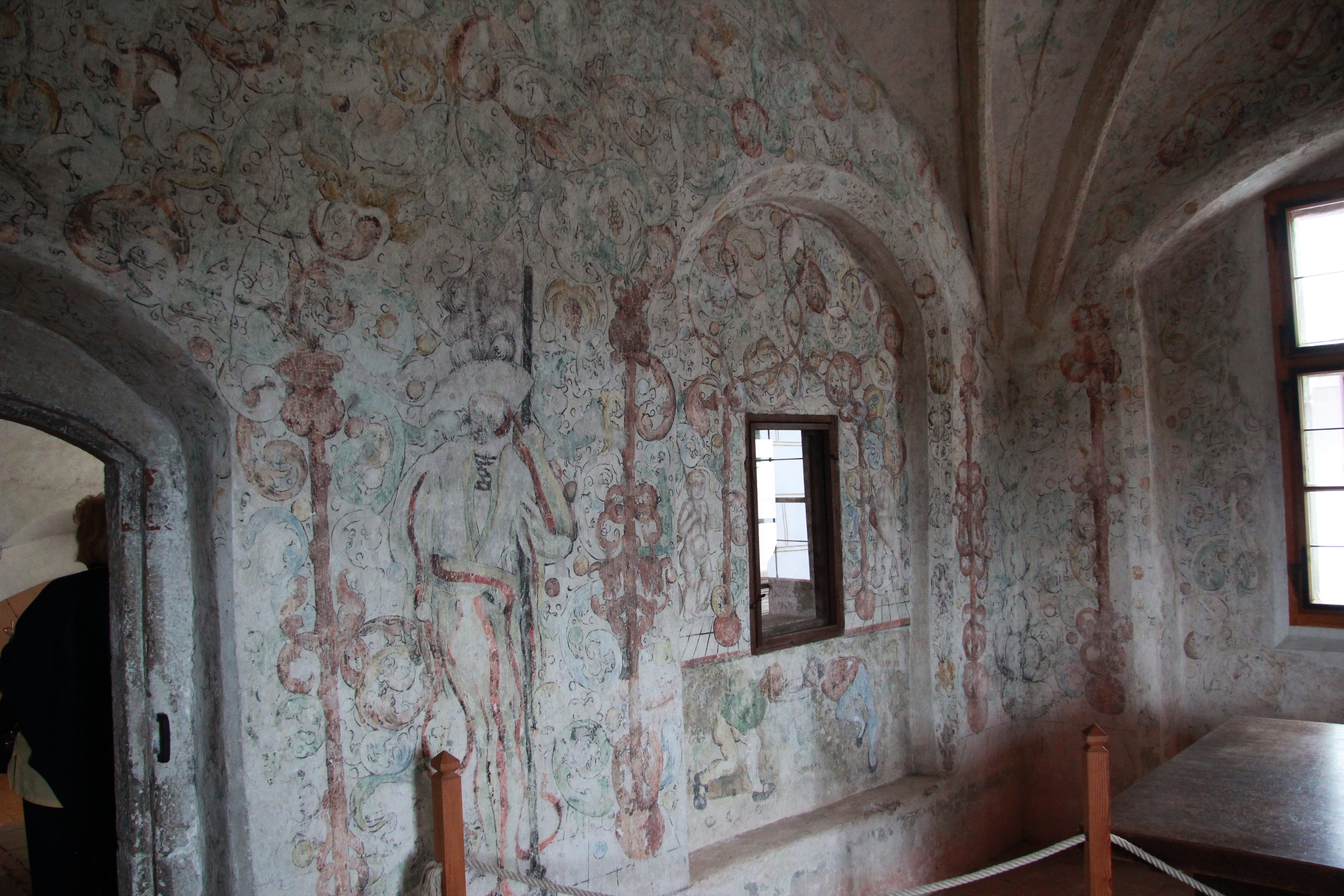 Burg Rappottenstein im Waldviertel, Niederösterreich